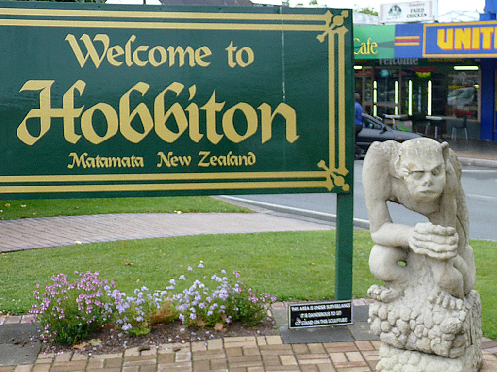 Matamata sign